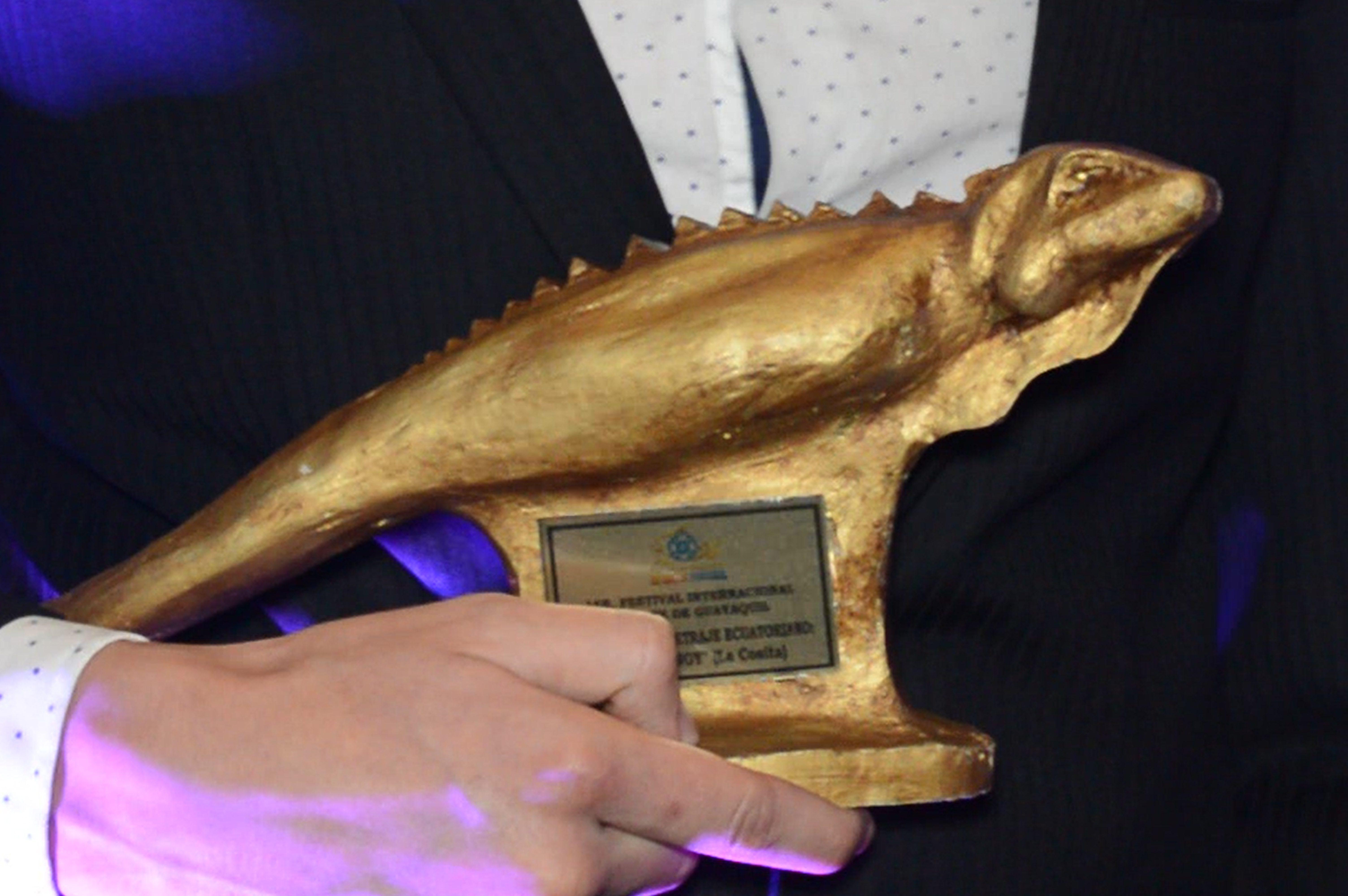 La estatuilla de la Iguana Dorada es el premio otorgado en el primer Festival Internacional de Cine de Guayaquil de 2015, creada y diseñada por el artista Felipe Crespo.